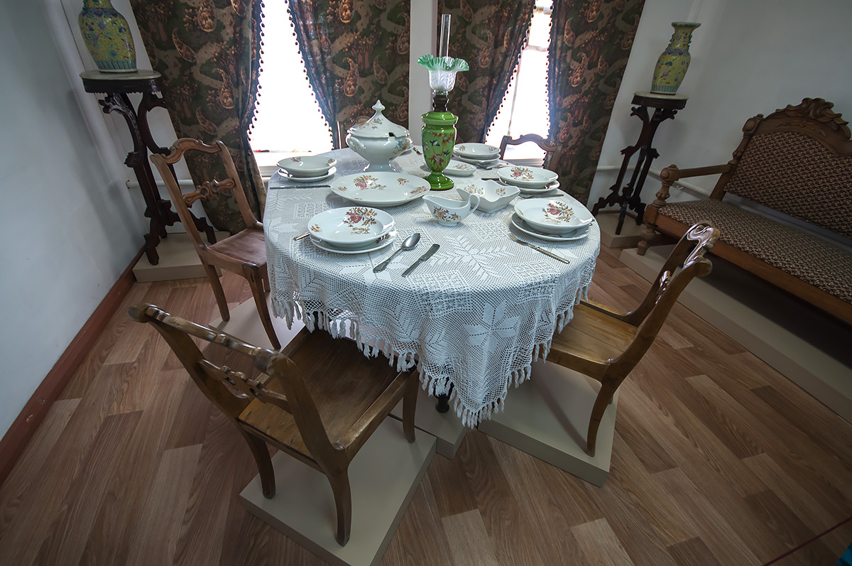 Дом жилой и контора управляющего Сузунским медеплавильным заводом: улица Ленина, 15, Сузун, Сузунский район, Новосибирская область